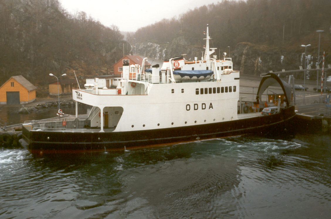 M/F Odda, built 1968.